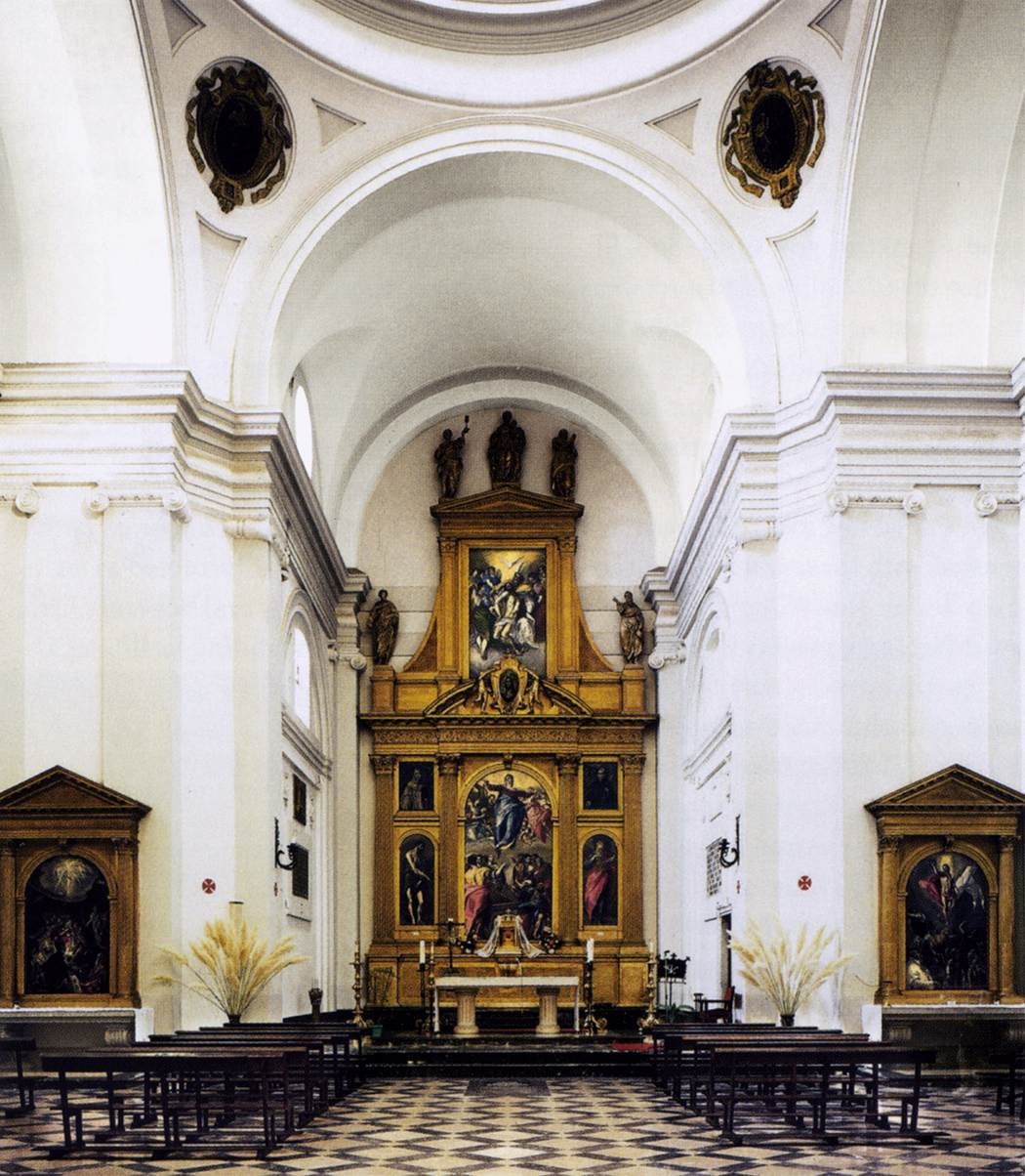 Retablo mayor con pinturas de El Greco del Convento de Santo Domingo el Antiguo de Toledo